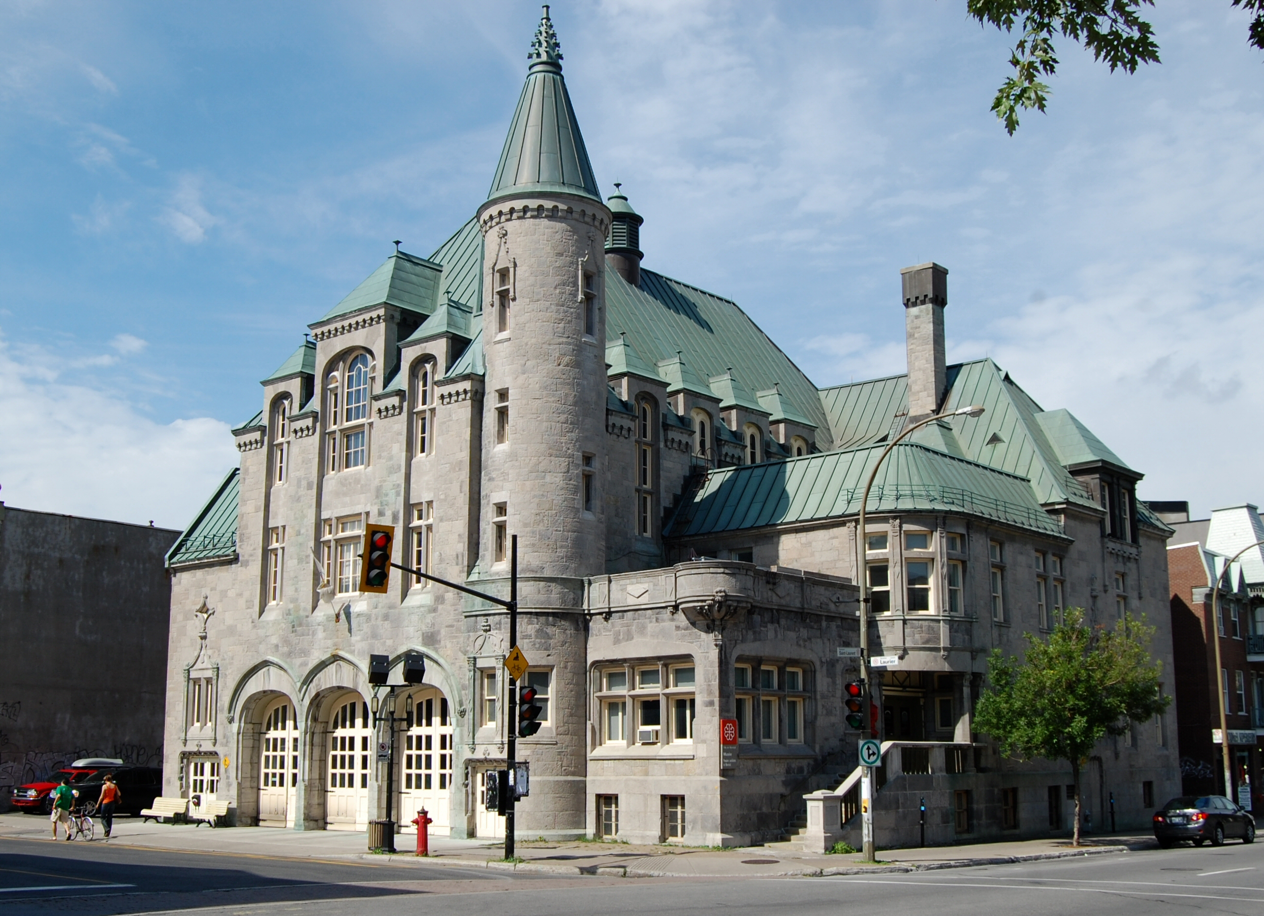 Caserne 30, qui a déjà été l'hôtel de ville de Saint-Louis du Mile-End, au coin de l'avenue Laurier et du boulevard Saint-Laurent, Montréal Grand répertoire du patrimoine bâti de Montréal Images Montréal